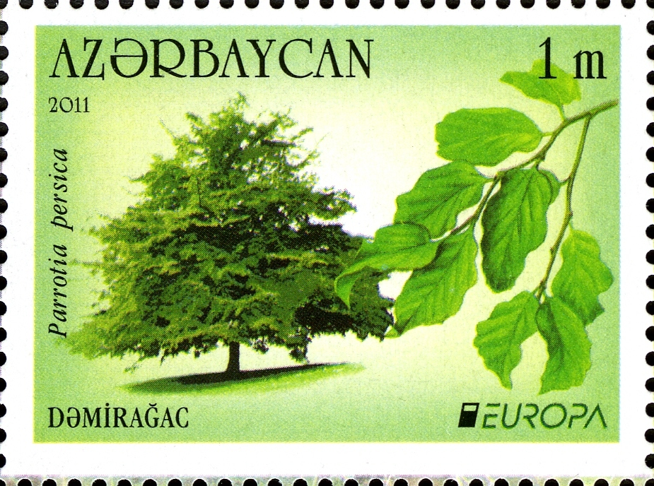 Dəmirağac